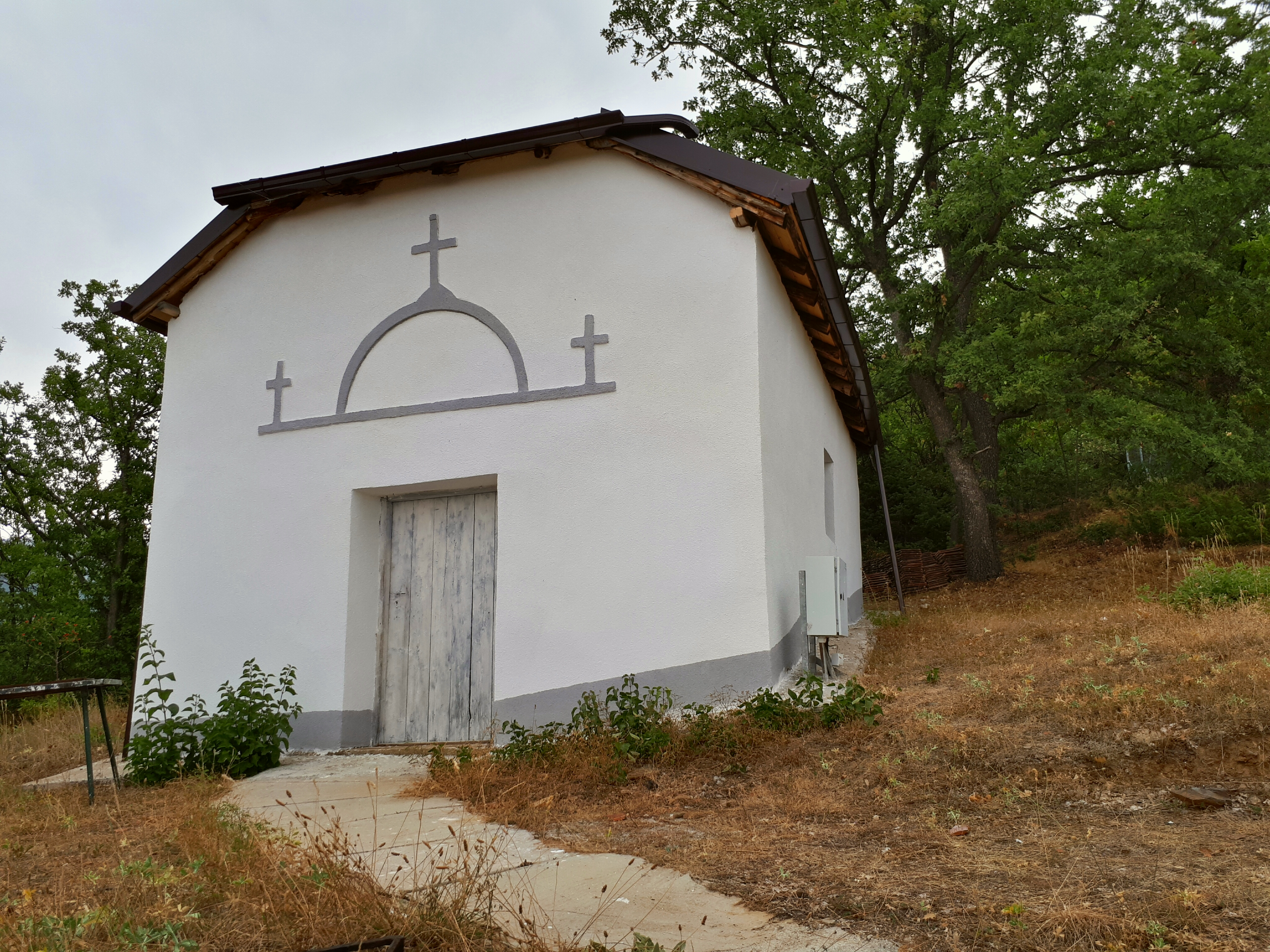 Група Архитектура на вториот ден на Викикамп Брајчино 2017